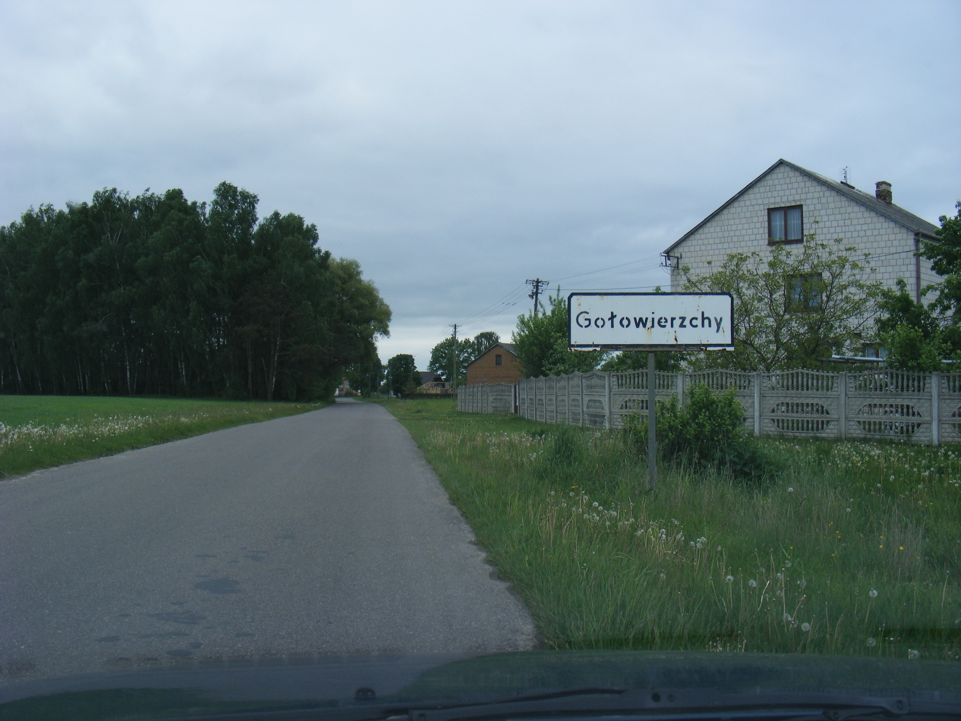 Wjazd do Gołowierzchów od strony Wólki Konopnej